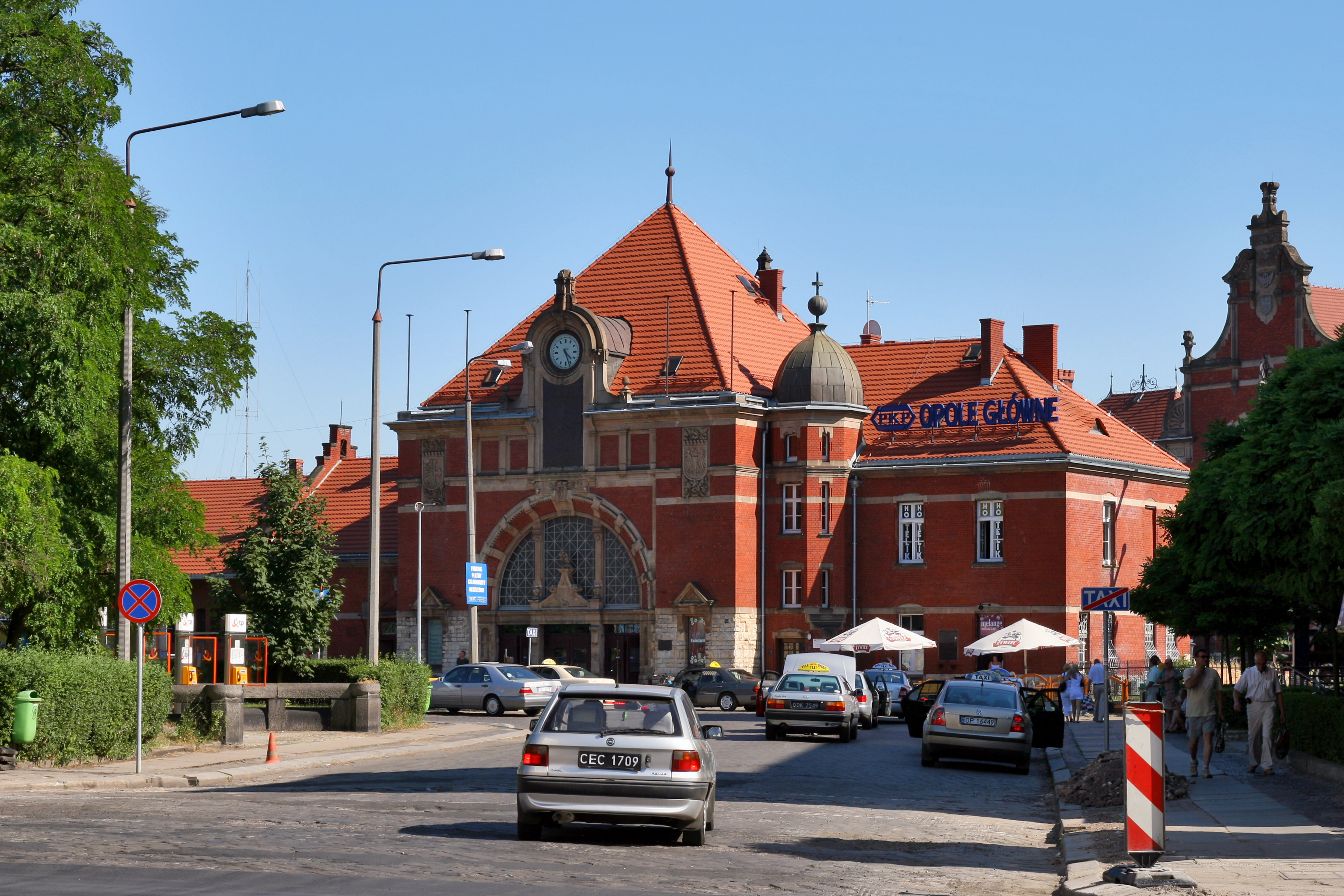 Opole, ul. Krakowska - zespół dworca PKP: budynek główny z przejściem podziemnym, pocz. XX